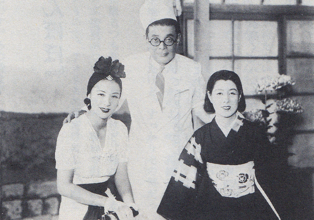 水の江瀧子、井上正夫、水谷八重子